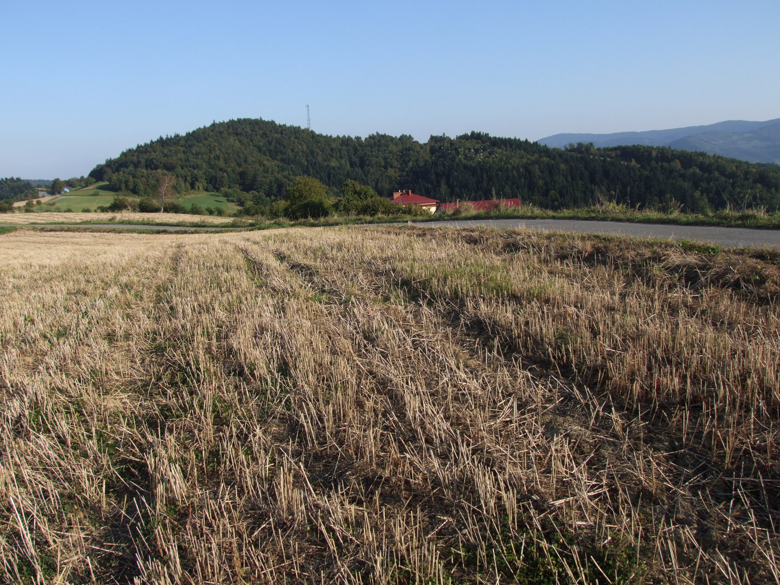 Cuba. Widok z punktu widokowego na przełęczy Widoma